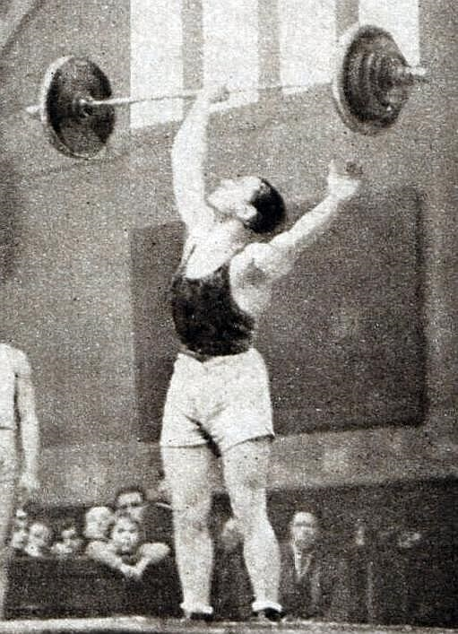 Pierre Alleene, recordman du monde des poids moyens à l'arraché, en mars 1933 (91,5kg).